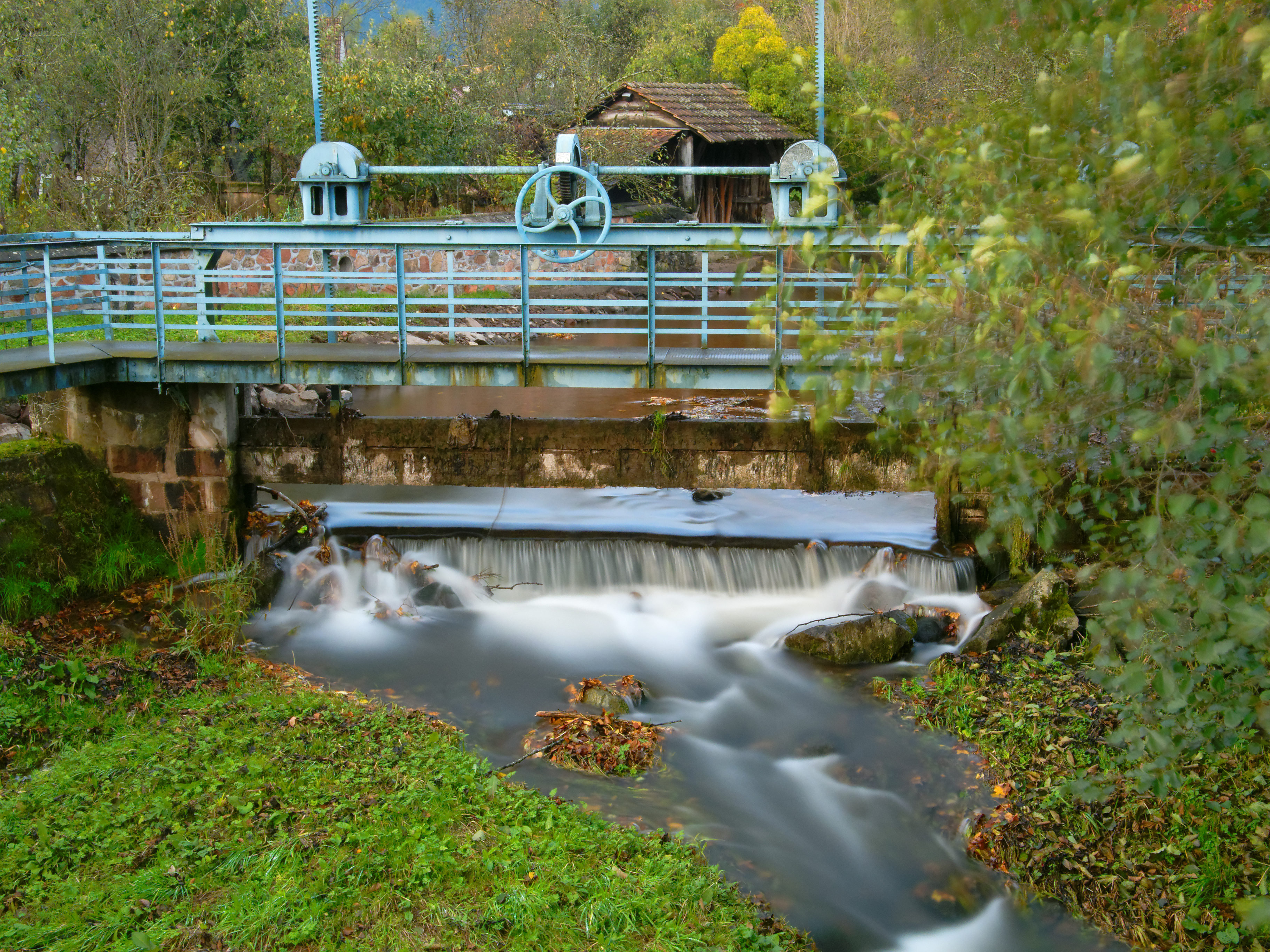 La Rougegoutte, à Rougegoutte. Photo réalisée avec un filtre ND400.